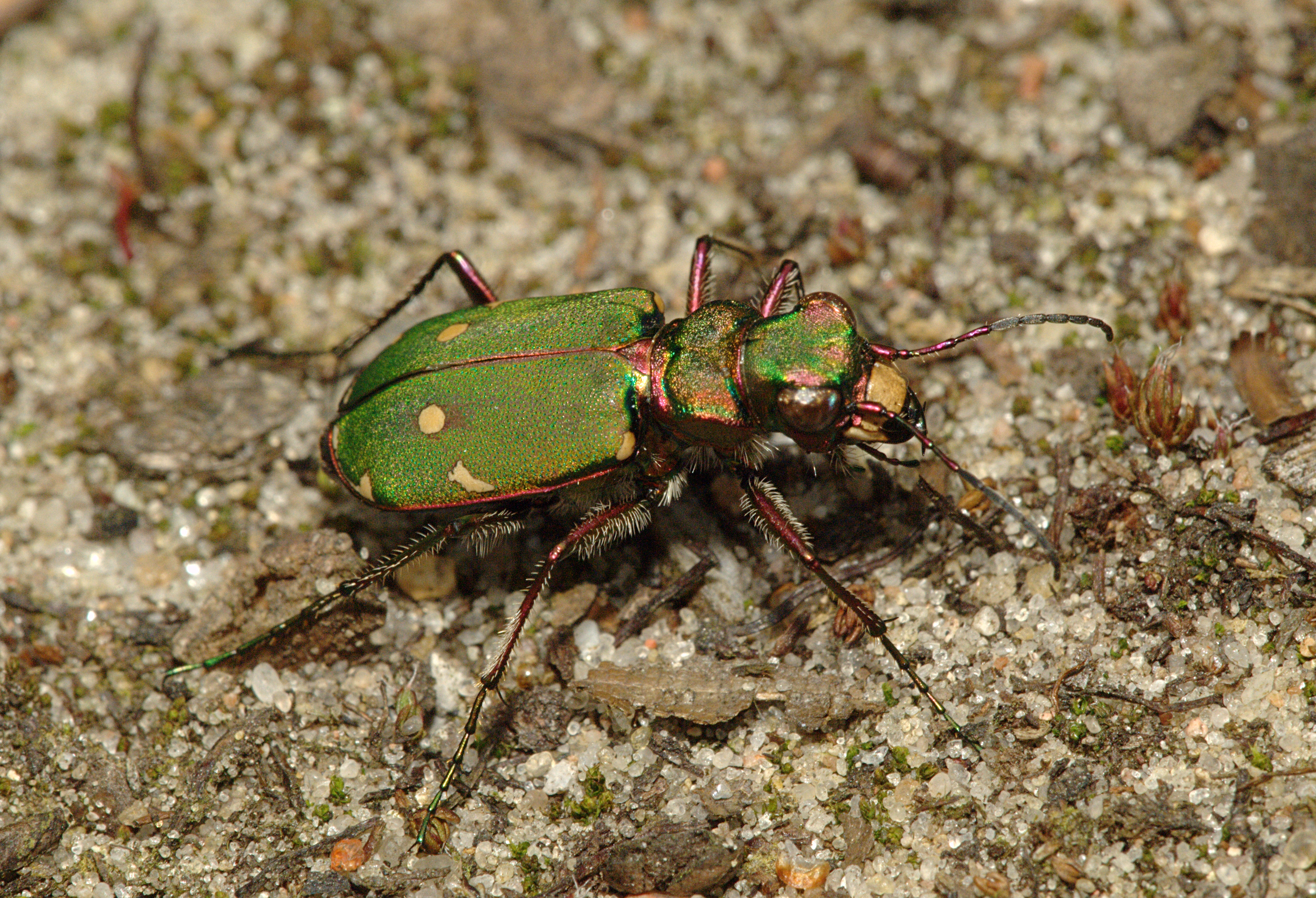 Cicindela campestris